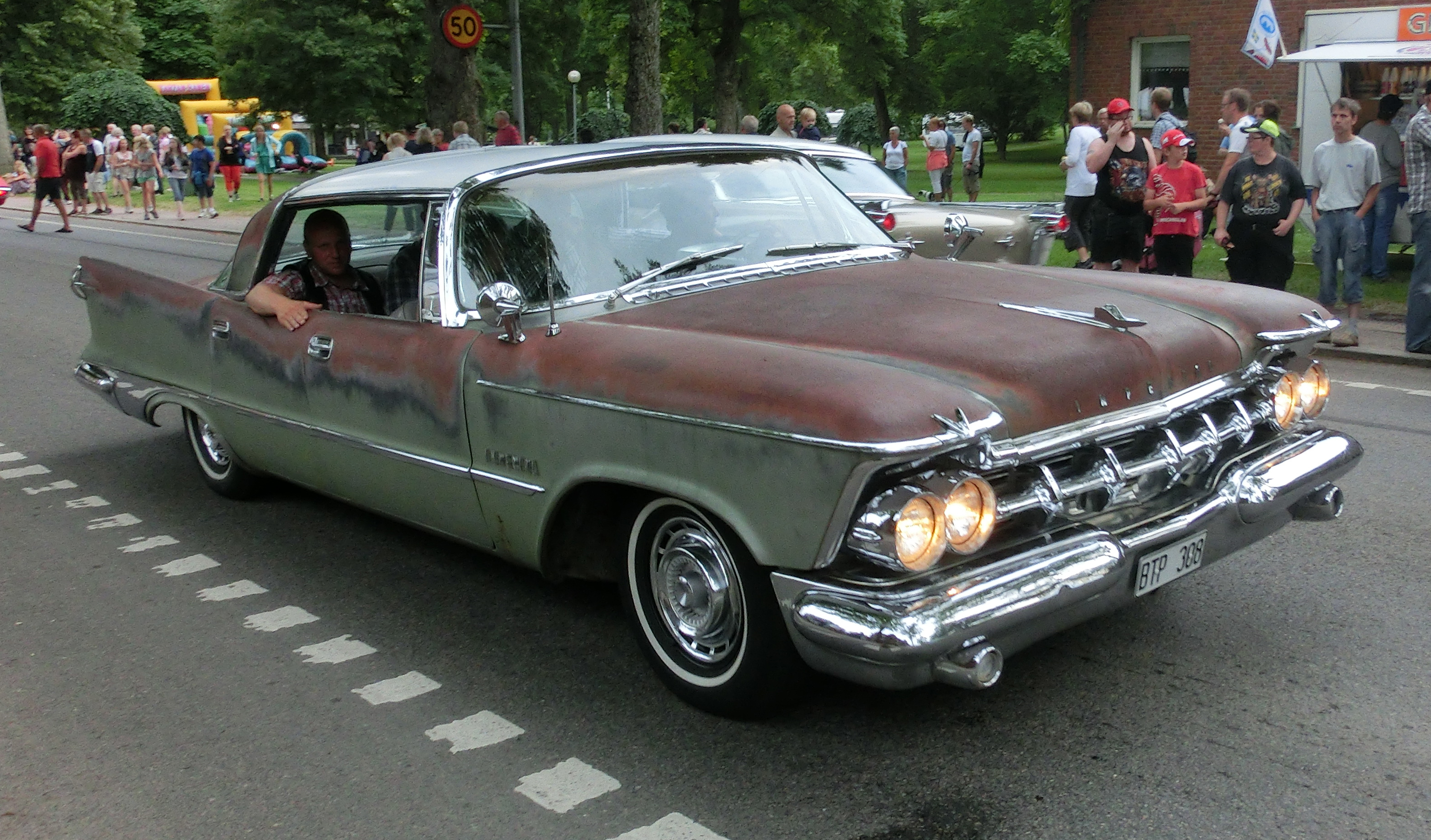 En Chrysler Imperial 1959 på cruising i Falköping 2013-07-27. Värt att notera är att lacken verkar vara bortslipad på stora delar av bilen för att medvetet låta plåten rosta och därigenom ge en extremt matt yta.